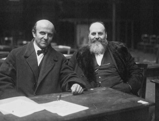 Congrès socialiste : Grumbach, Modigliani (Italie) : photographie de presse